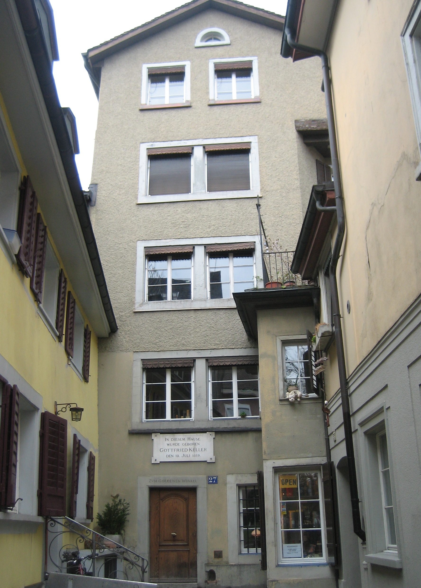 Geburtshaus von Gottfried Keller am Neumarkt in Zürich